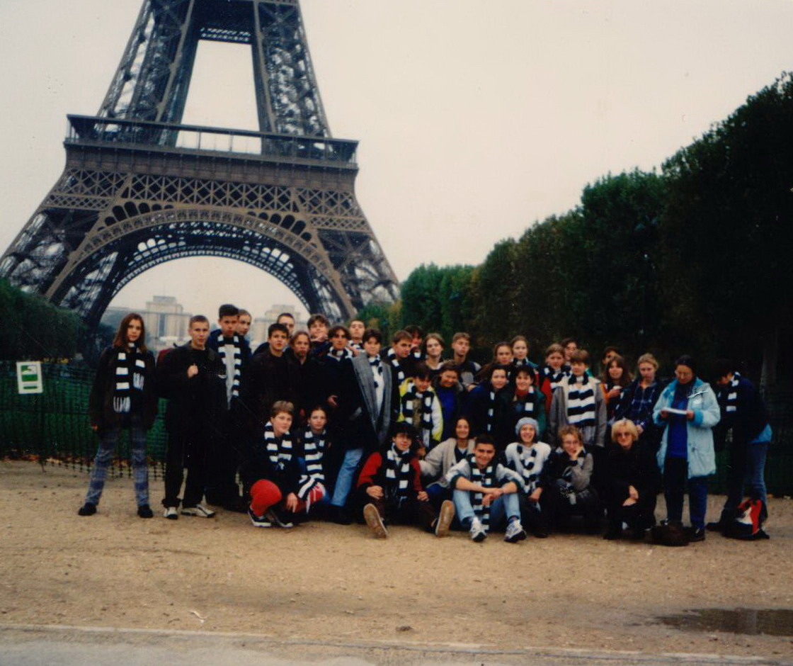 Szalik - element ubioru